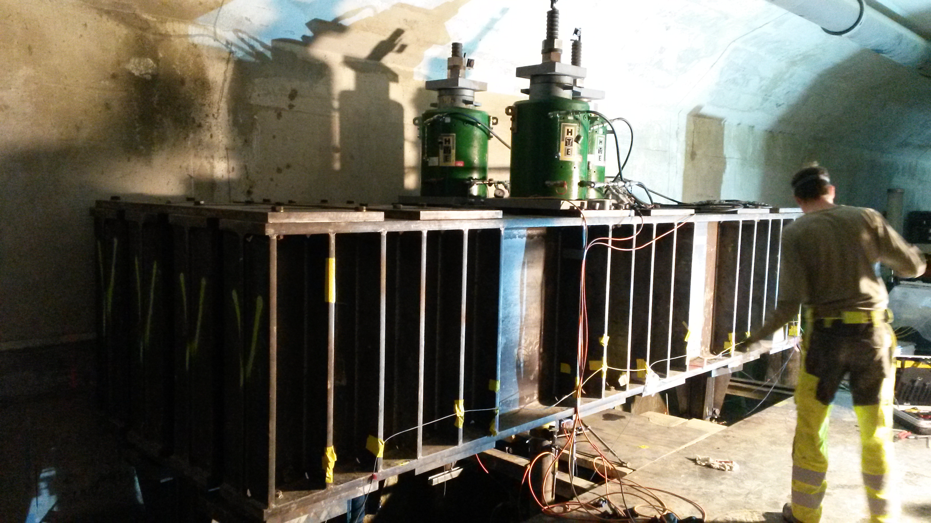 Zug und Druckversuche an Mikropfählen mittels zweifachwirkenden Hydraulikpressen